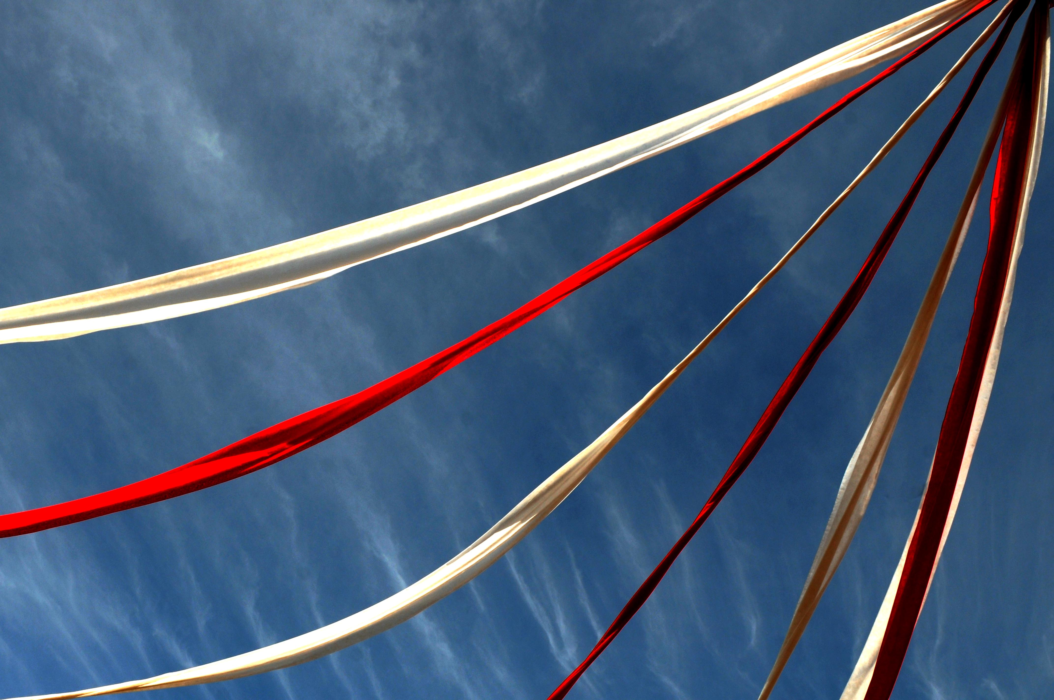 Planaltina, Brasília, DF, Brasil, 23/5/2015 Foto: Gabriel Jabur/Agência Brasília